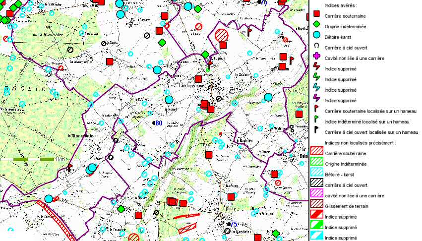 Risques naturels liés aux sous sol dans la commune de Landepereuse